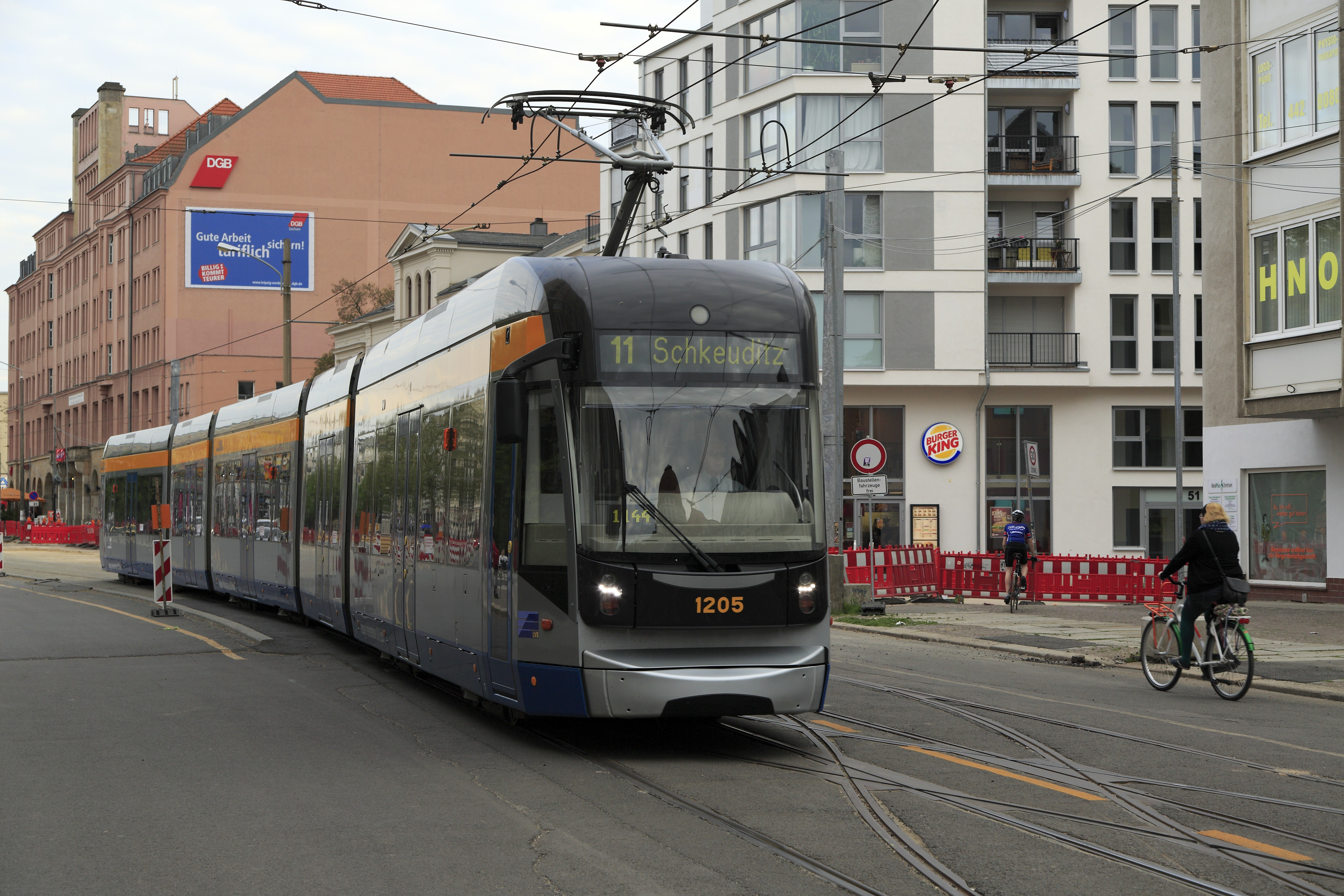 Typ 38, Zug der Linie 11 auf dem doppelten Baugleiswechsel auf Höhe der Paul-Gruner-Straße. Wegen der Länge des eingleisig befahrbaren Abschnittes zwischen Roßplatz und Körnerstraße und der Streckenbelegung musste auf Höhe der haltestelle Hohe Straße eine provisorische Kreuzungsstelle vorgesehen werden.